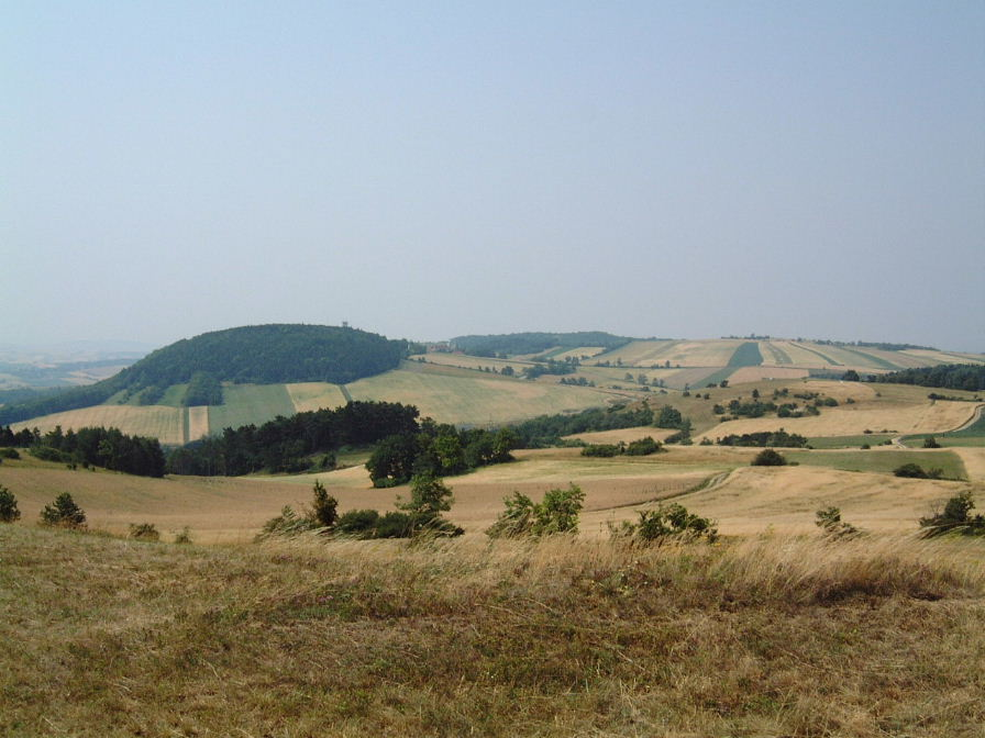 Buschberg - Links im Bild ist übrigens undeutlich der Aussichtsturm auf dem Oberleiserberg zu sehen, rund um den die alten Ausgrabungen zu finden sind.